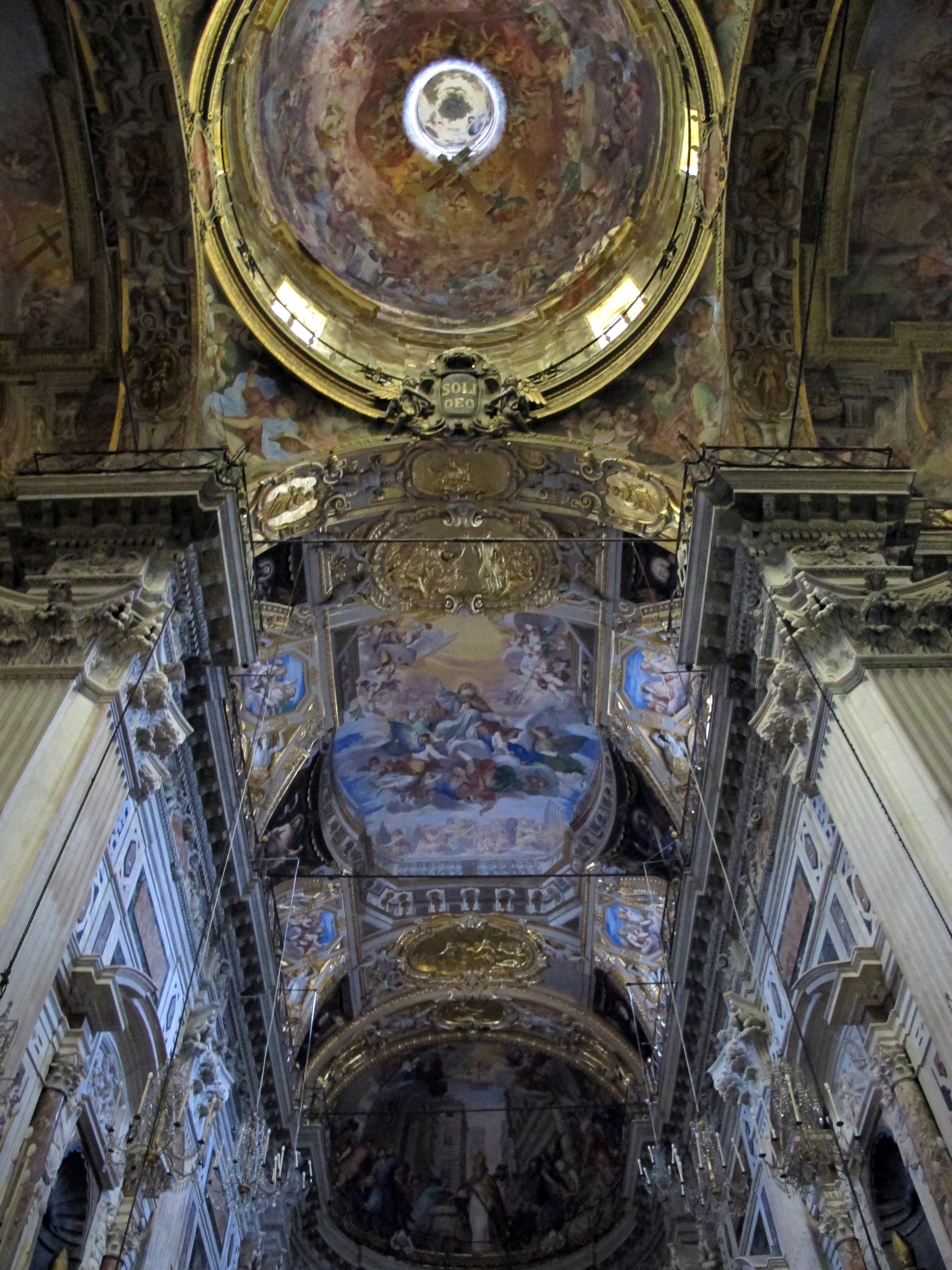 San Siro (Genova)